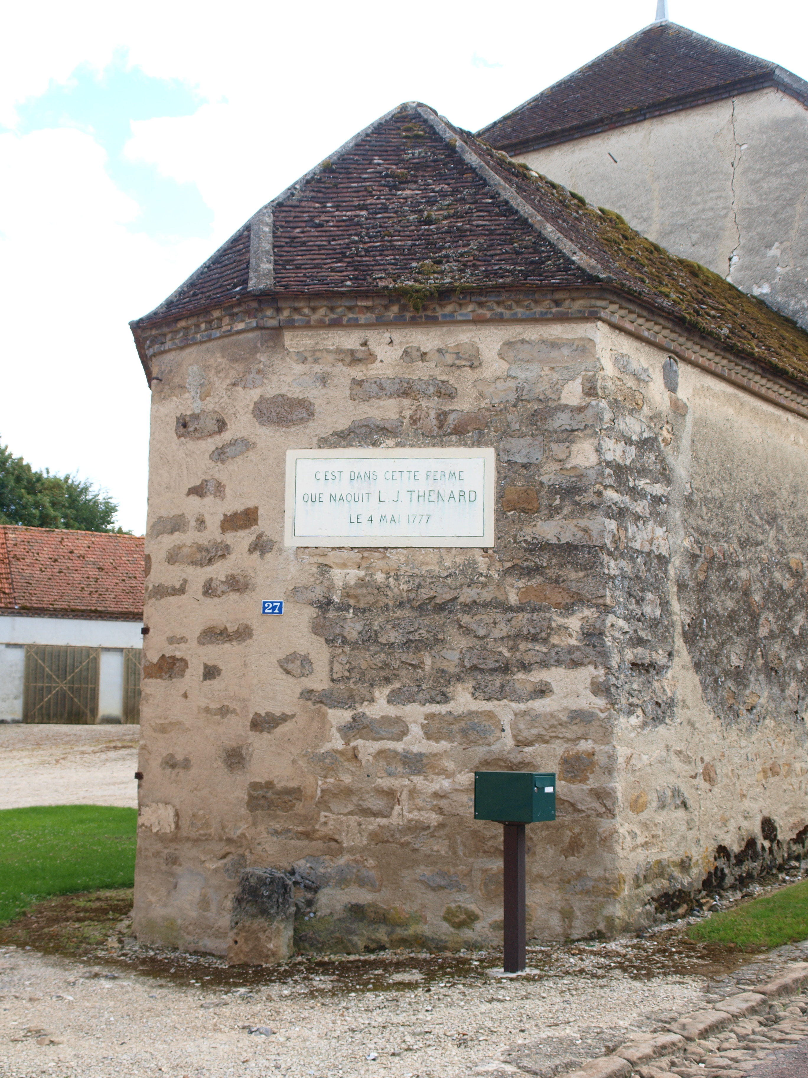 La Louptière-Thénard (Aube, France) ; Louis Jacques Thénard